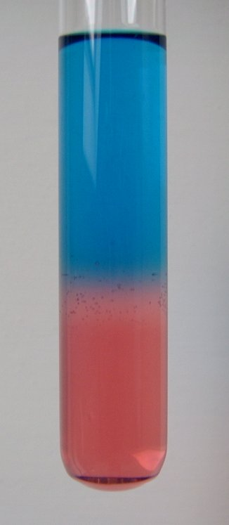 Kobalt(II)-thiocyanat aus Cobalt(II)-chlorid und Kaliumthiocynat (oben in Aceton, unten in Wasser)